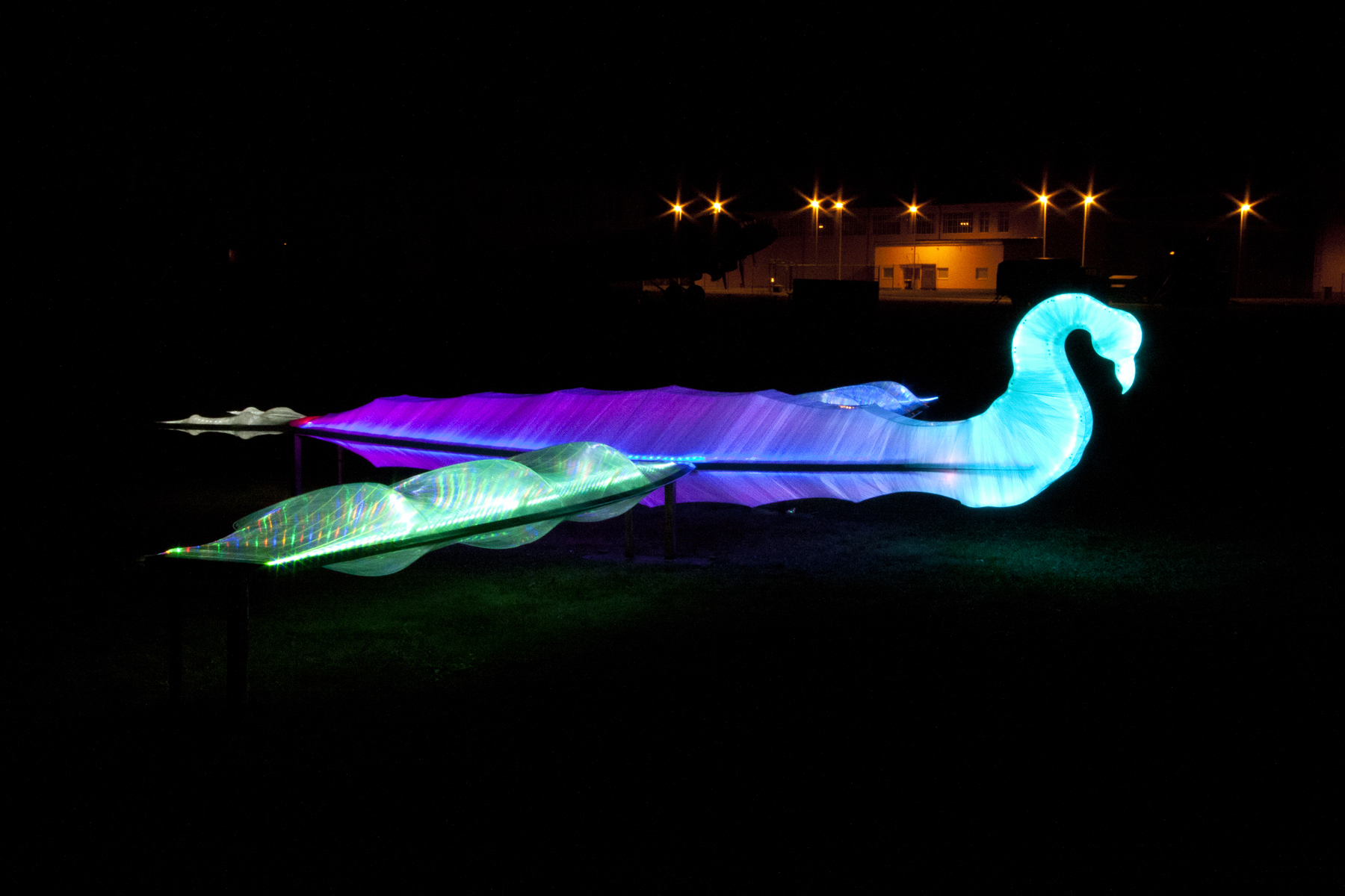 Friedensvogel "Anouk" bei Nacht. Ein Kunstwerk des deutsch-irakischen Künstlers Schamal, ausgestellt im Freigelände des Militärhistorischen Museums der Bundeswehr Flugplatz Berlin-Gatow